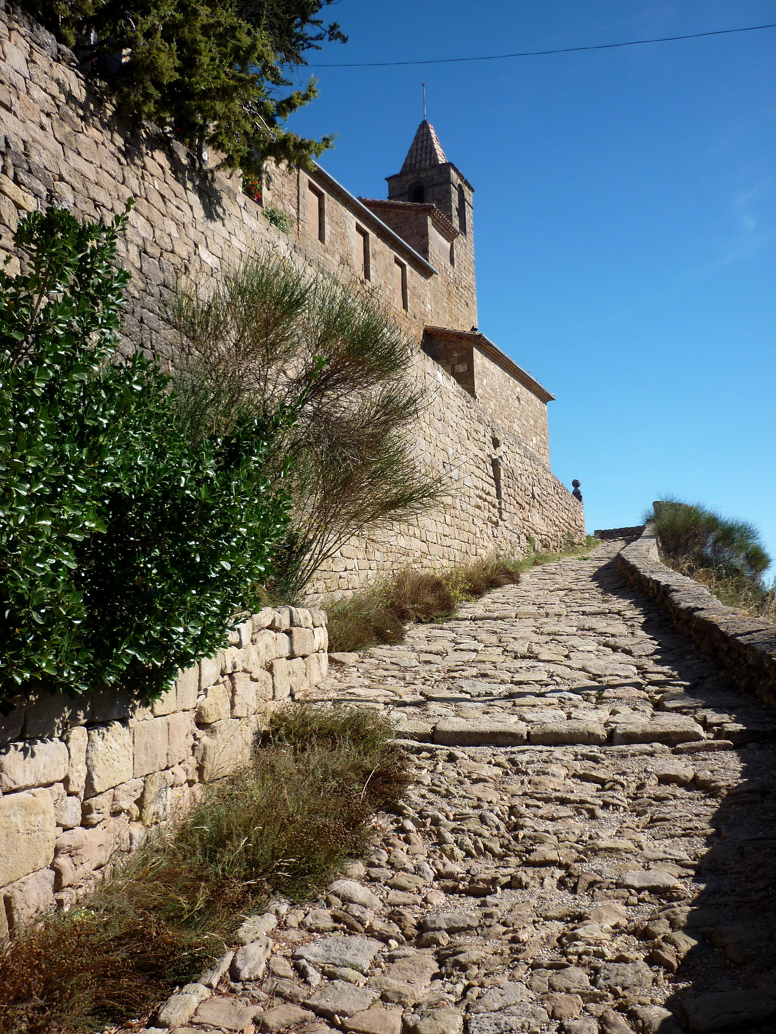 Castellvell de Solsona (Olius): pujada al castell